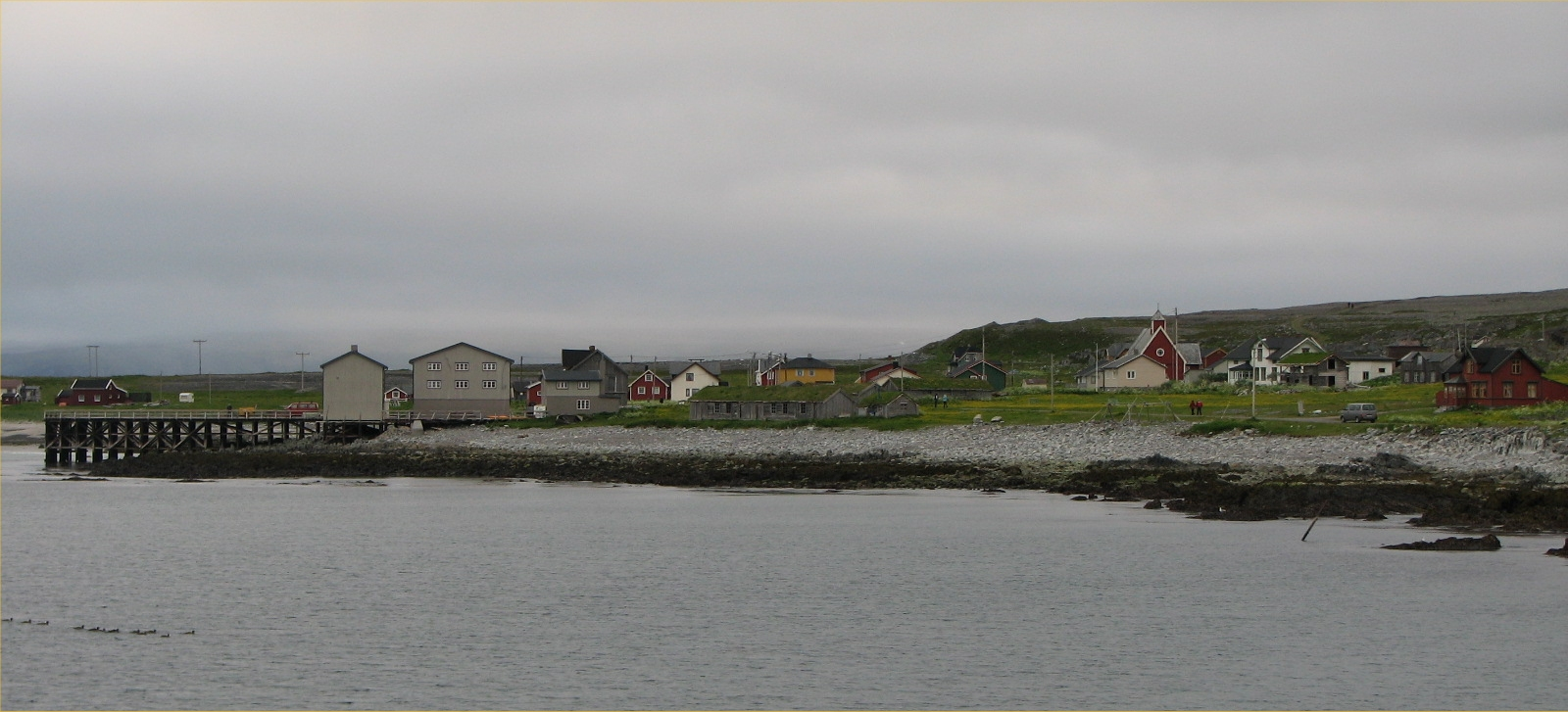 Hamningberg sett fra moloen.